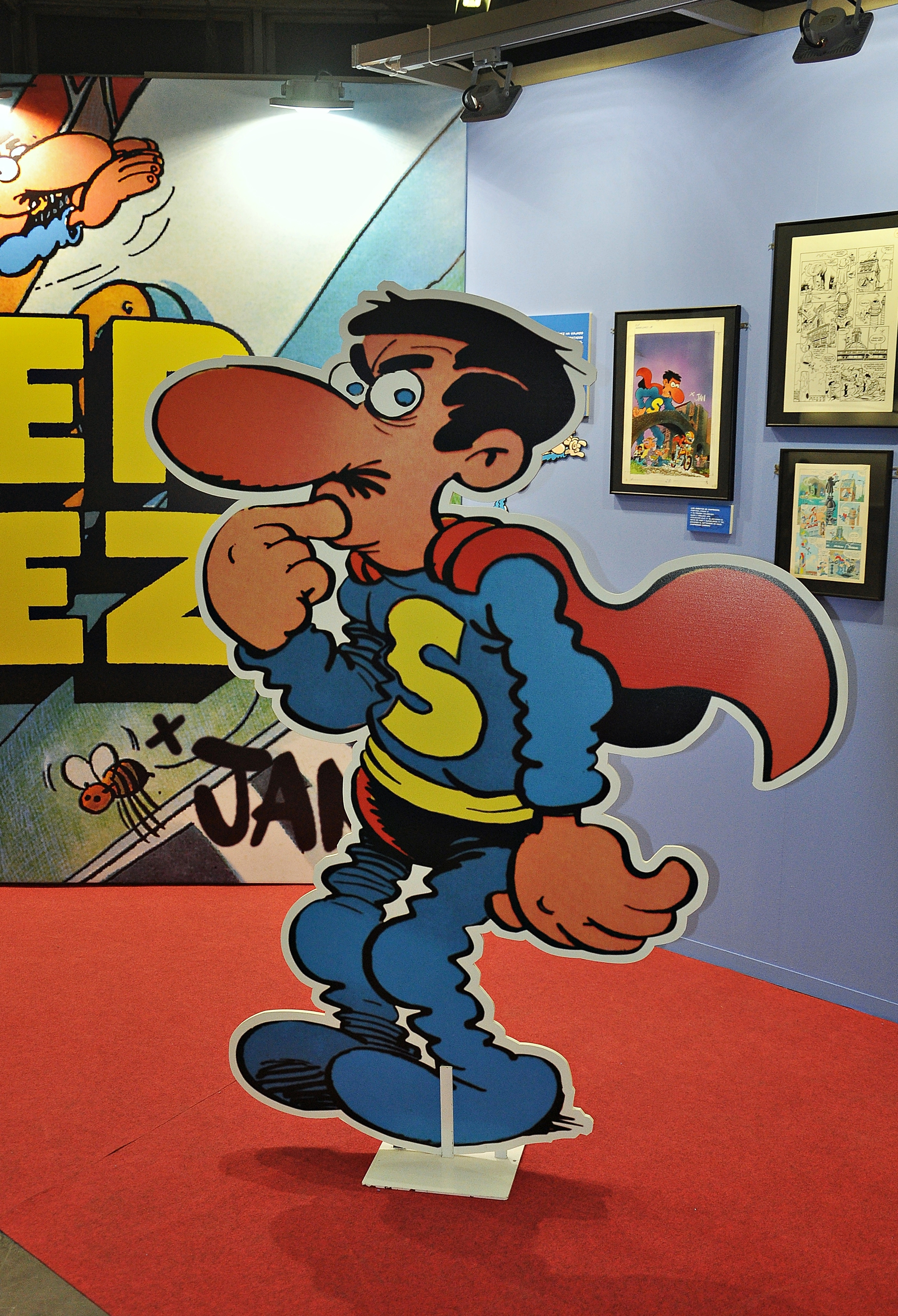 Exposición Super Lopez